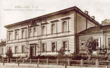 Открытка с изображением здания Анатомического театра Киевского университета Св. Владимира, фотограф Д.Марков, 1910 г.